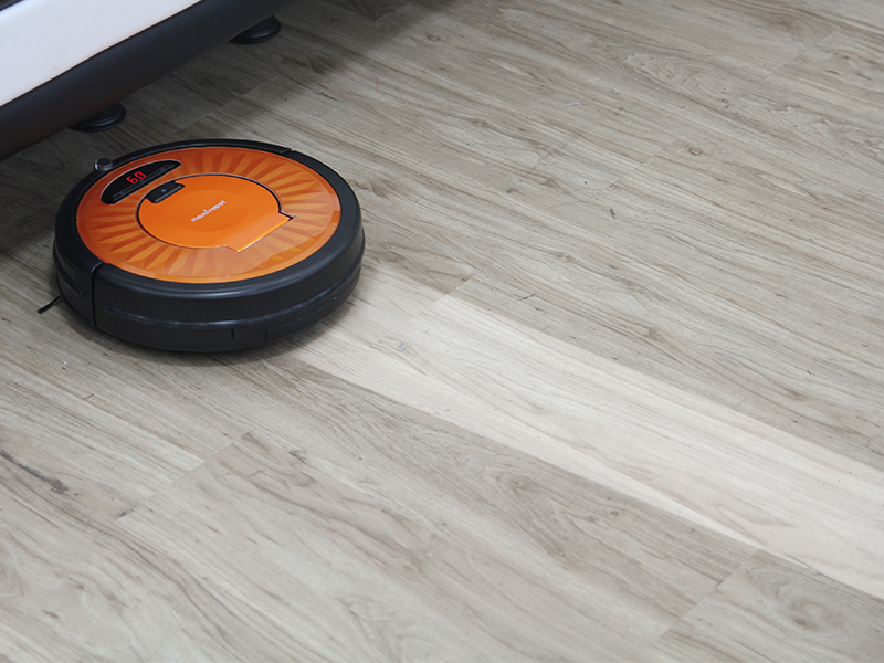 中文（香港）: 濕拖吸塵機械人